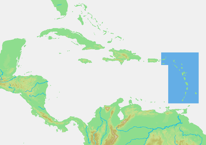 Caribbean - Bovenwindse eilanden.PNG